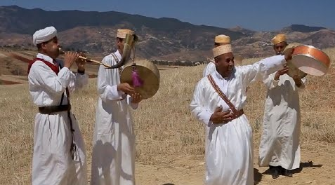 Il s'agit d'une troupe de Imdiazen (troubadours berbères) à Temsaman au Rif au Maroc, en train de jouer.